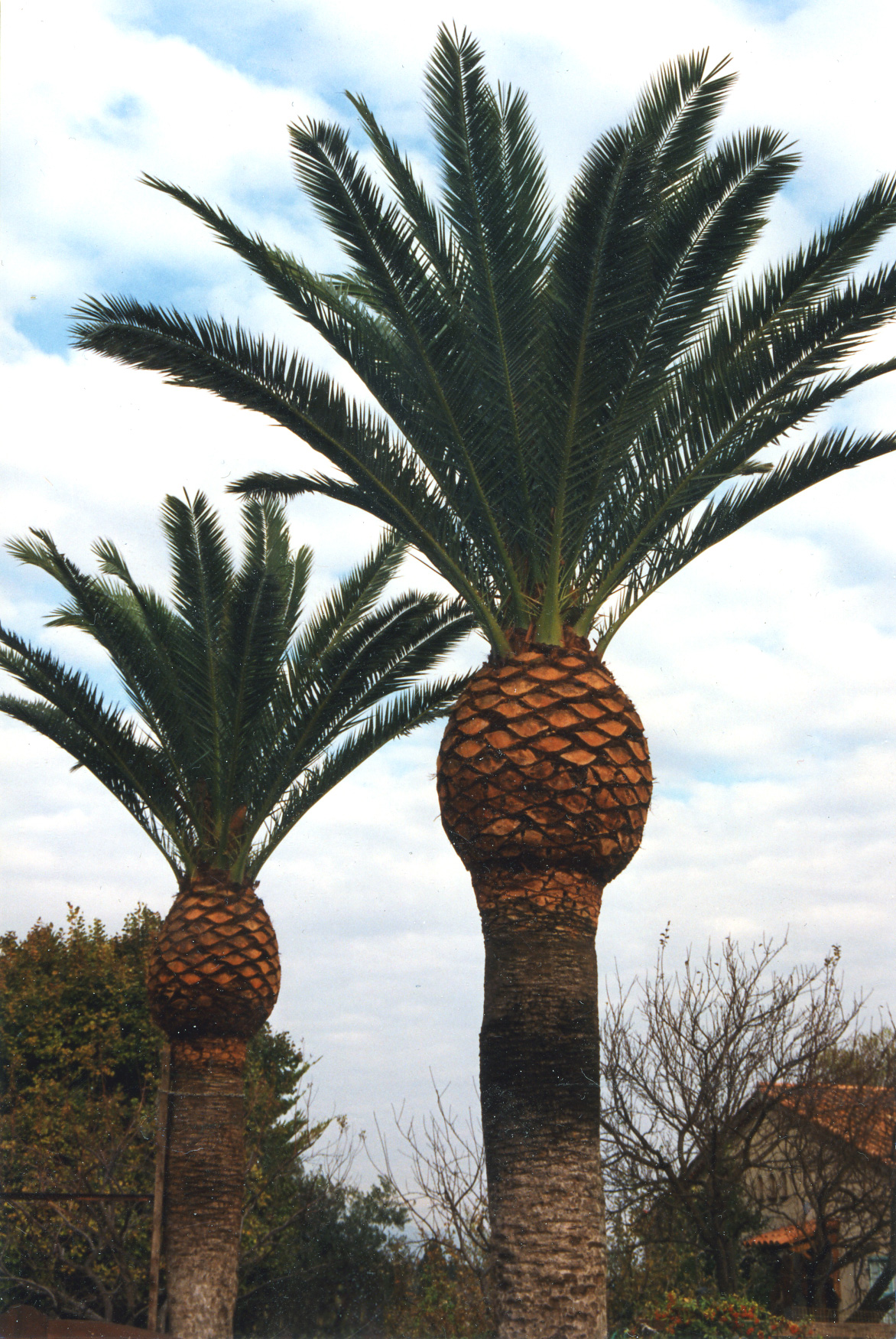 Kanariepalme i Antibes, Frankrike.